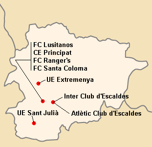 Répartition des clubs en Primera Divisio 2005-2006.